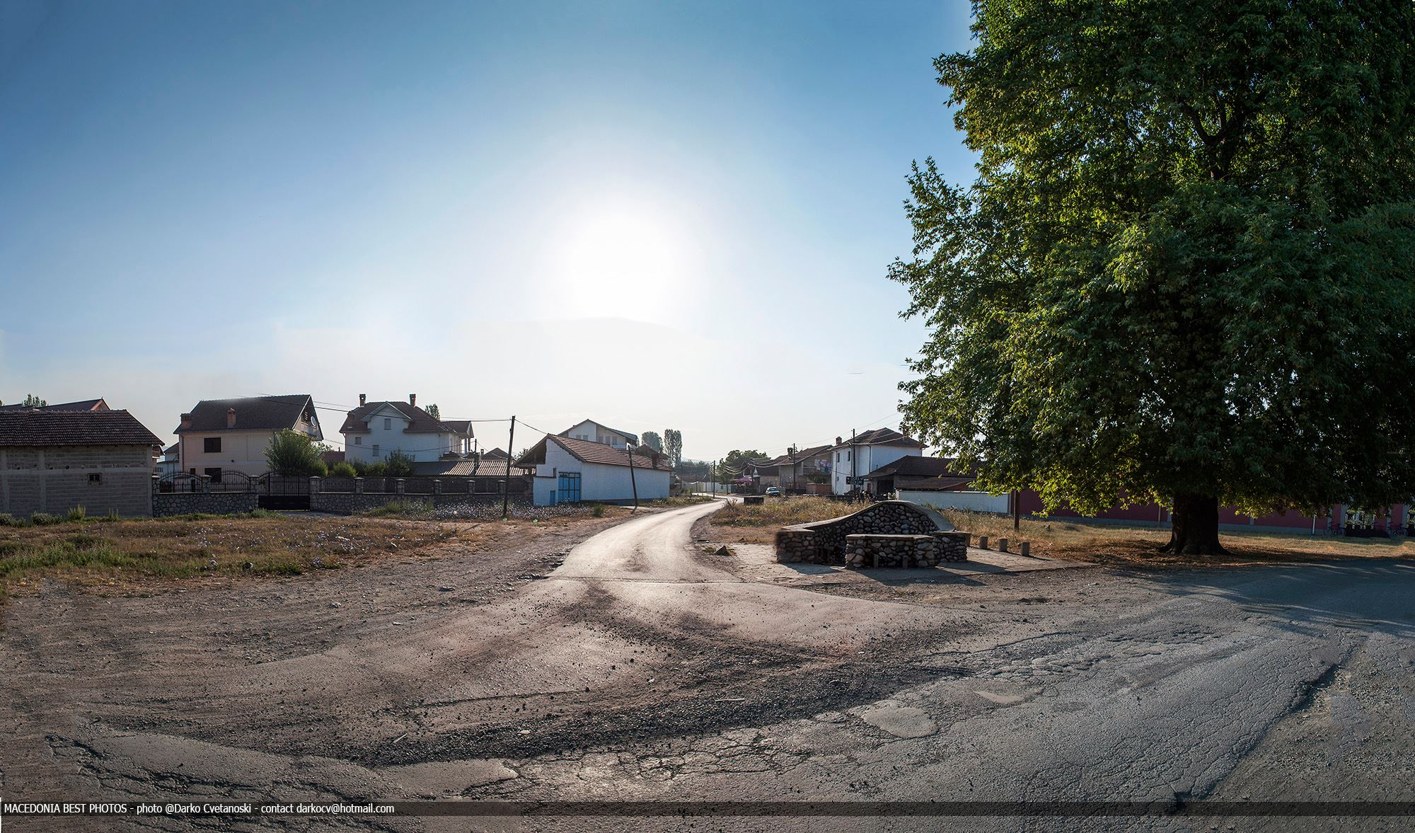 Ширината со големо дрво и селската чешма во Биџево